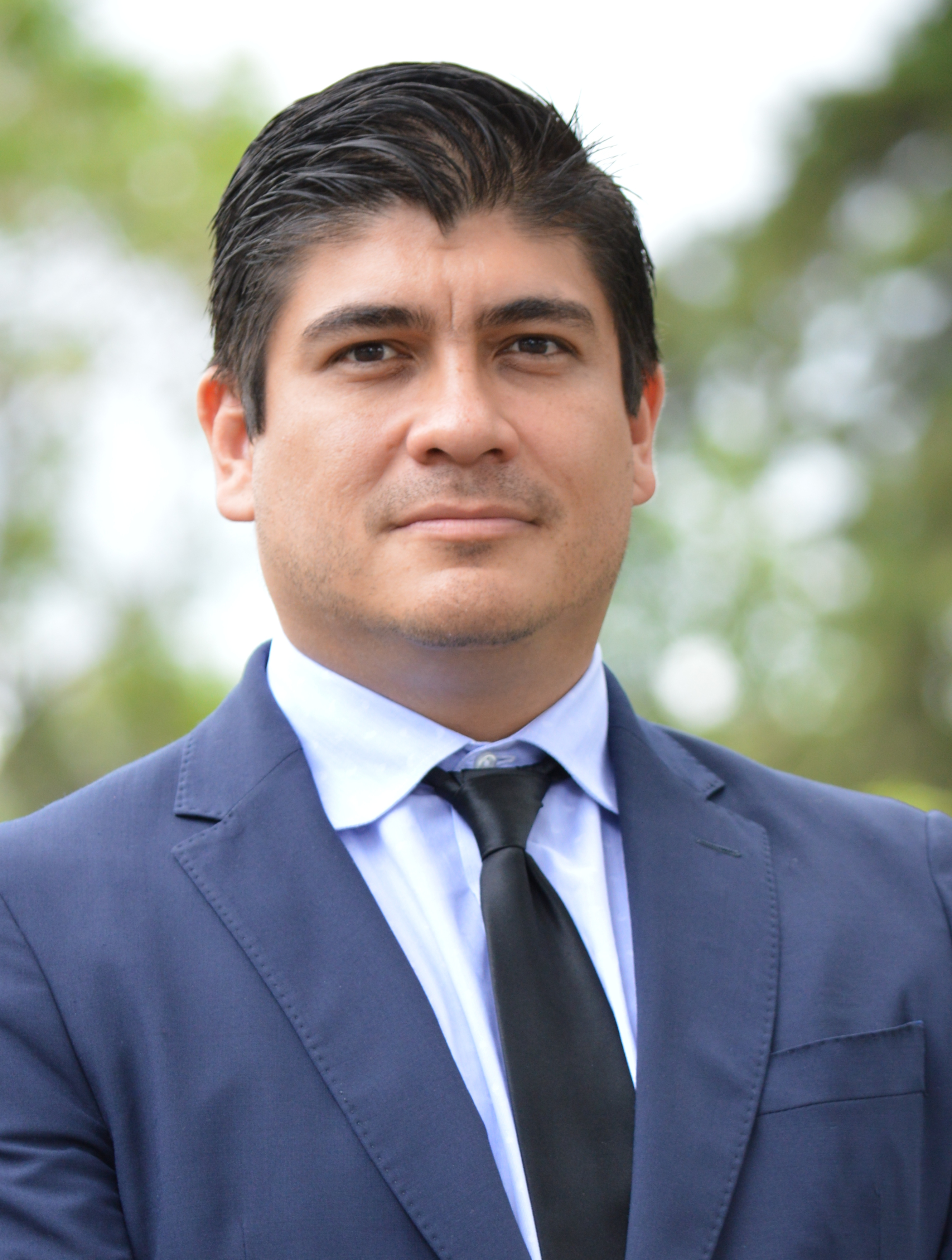 Carlos Alvarado Quesada, precandidato presidencial del Partido Acción Ciudadana.